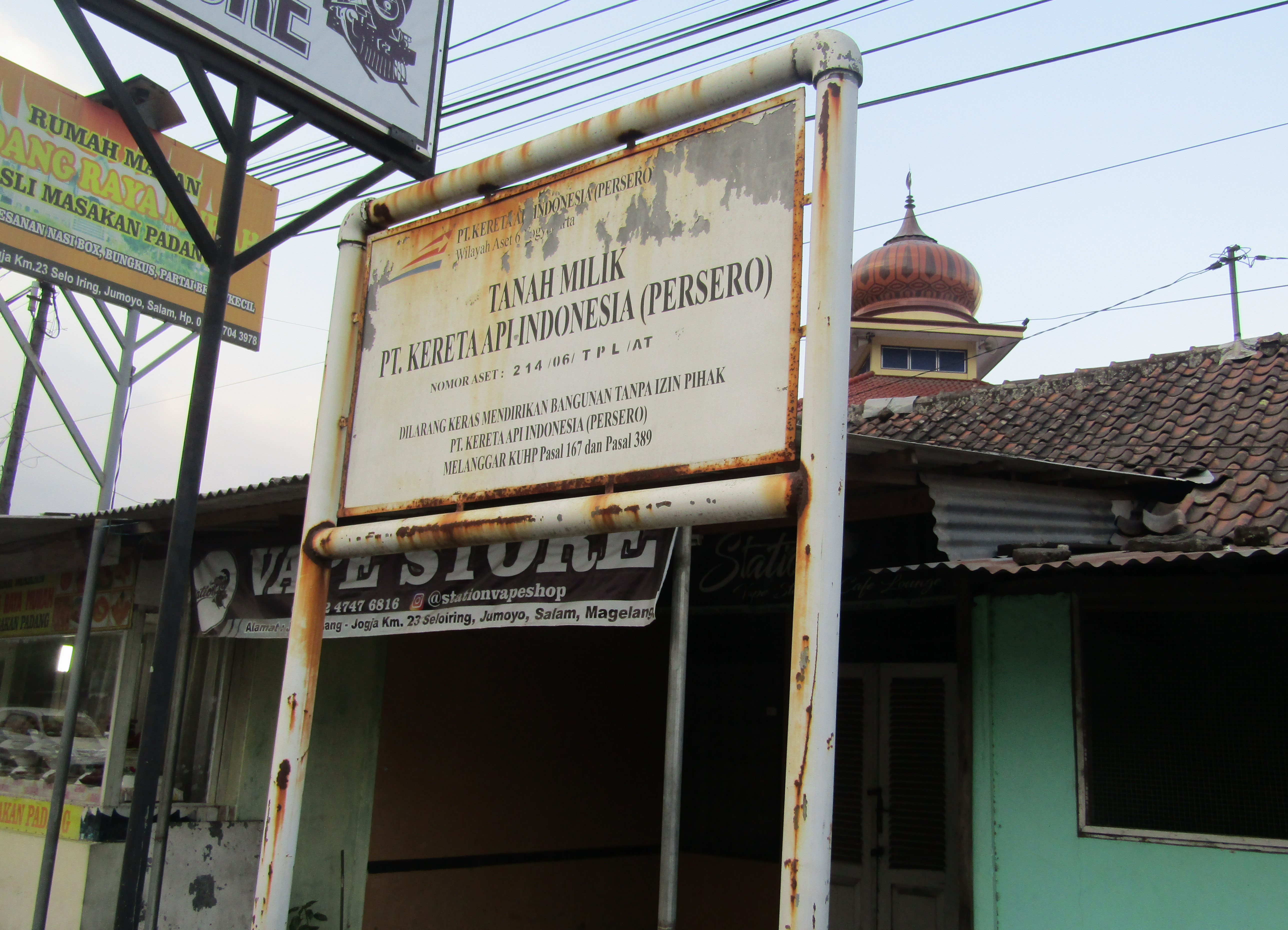 Stasiun Tegalsari tahun 2018, sudah menjadi warung makan